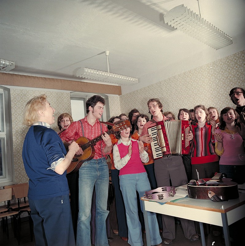 Original image description from the Deutsche Fotothek Tanzgruppe